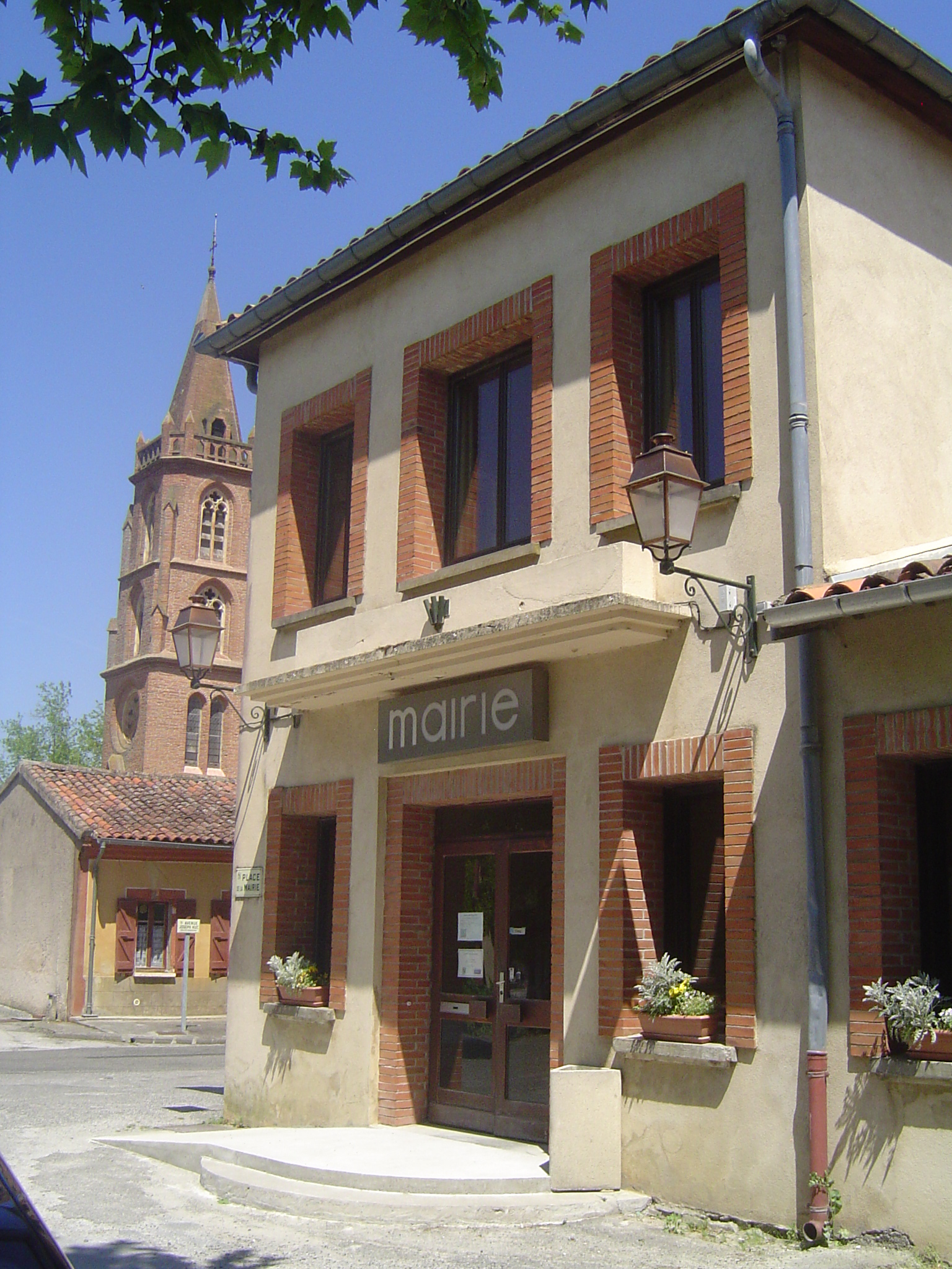 Mairie de Sainte-Foy-d'Aigrefeuille